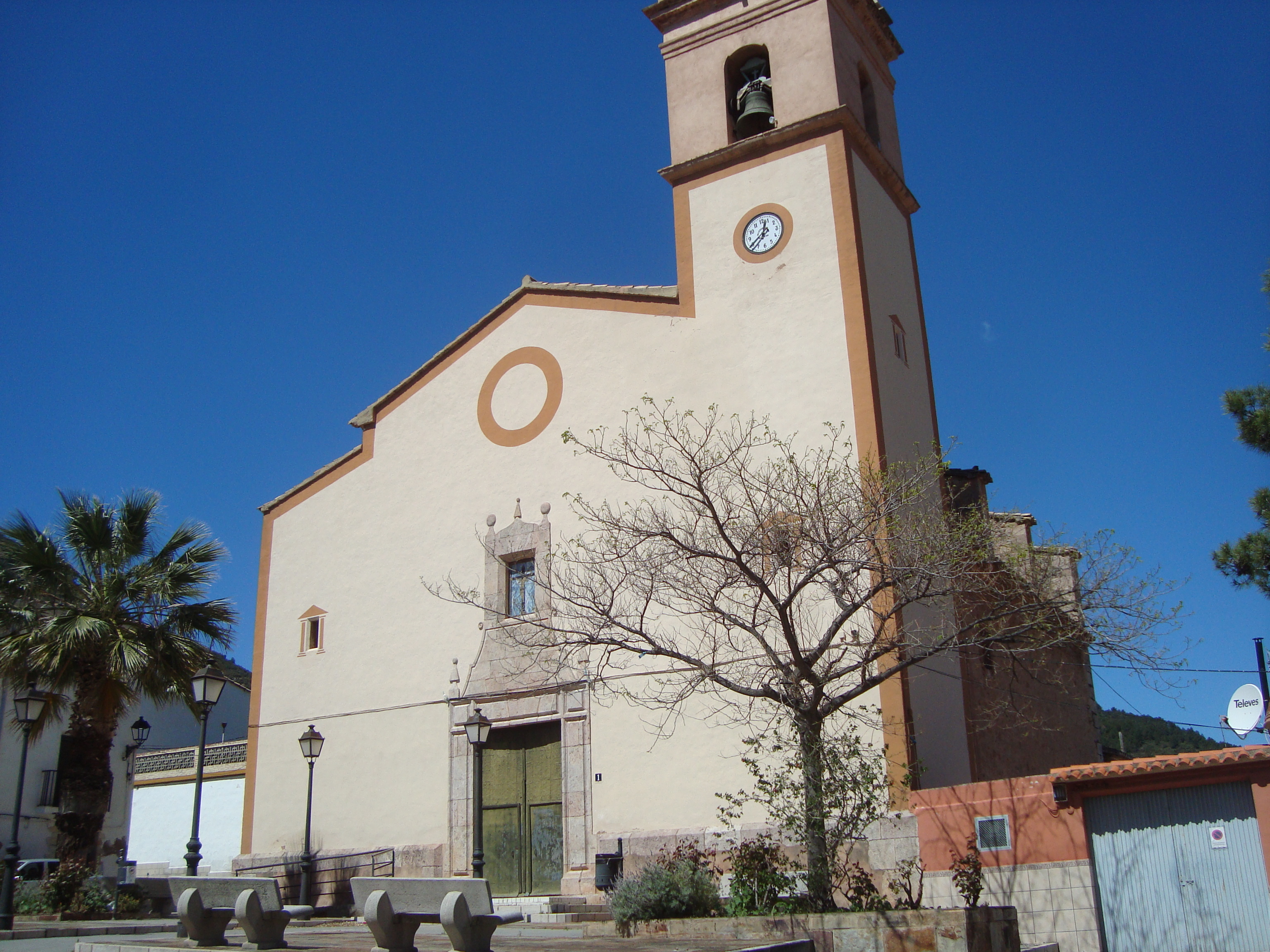 Església parroquial de la Immaculada Concepció (Toga) 08.113-003.